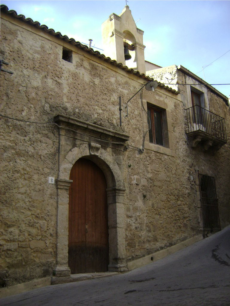 Chiesetta di Santa Cateriana a Mineo